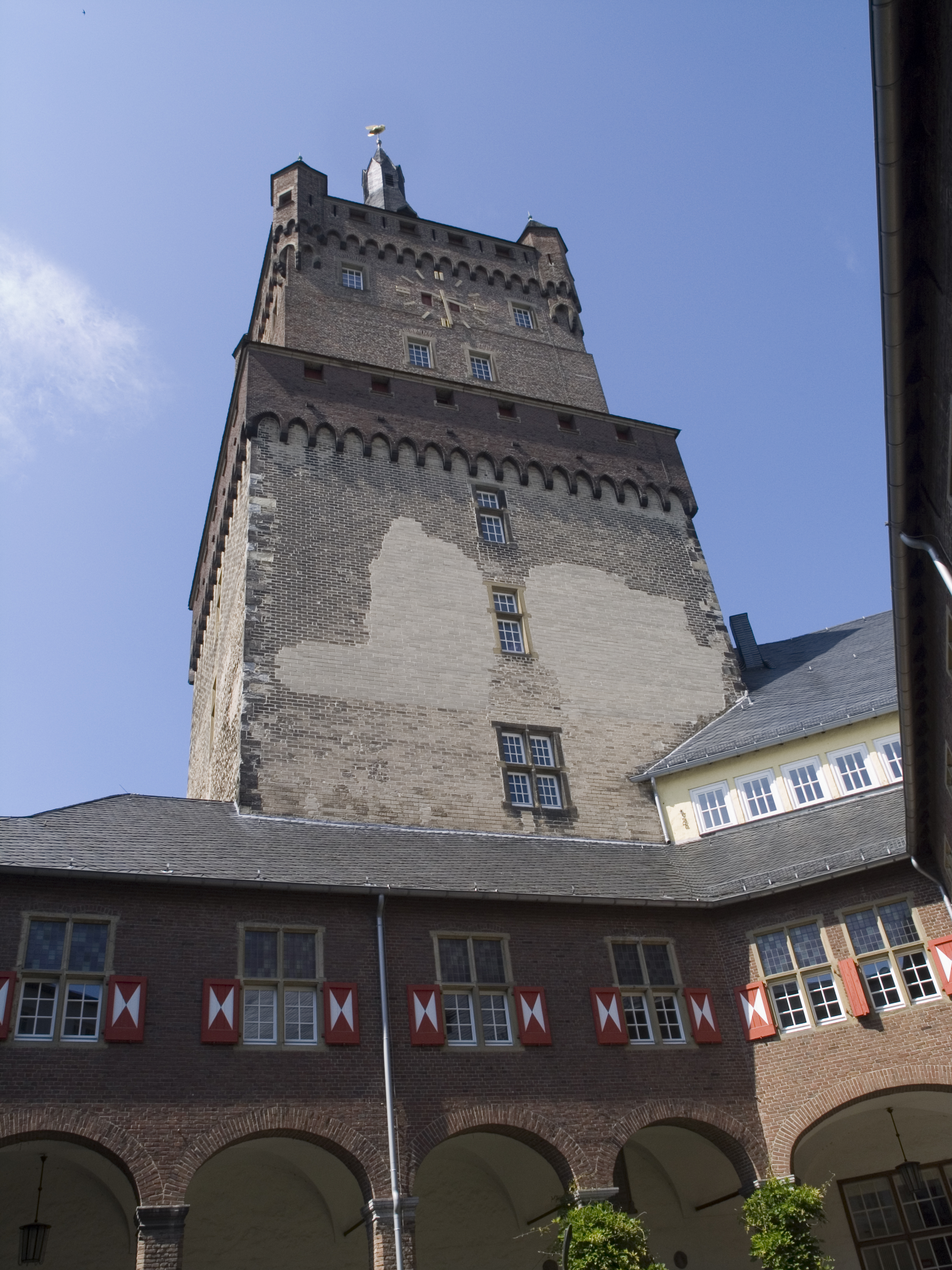 Северный Рейн-Вестфалия, Клеве – замок Шваненбург